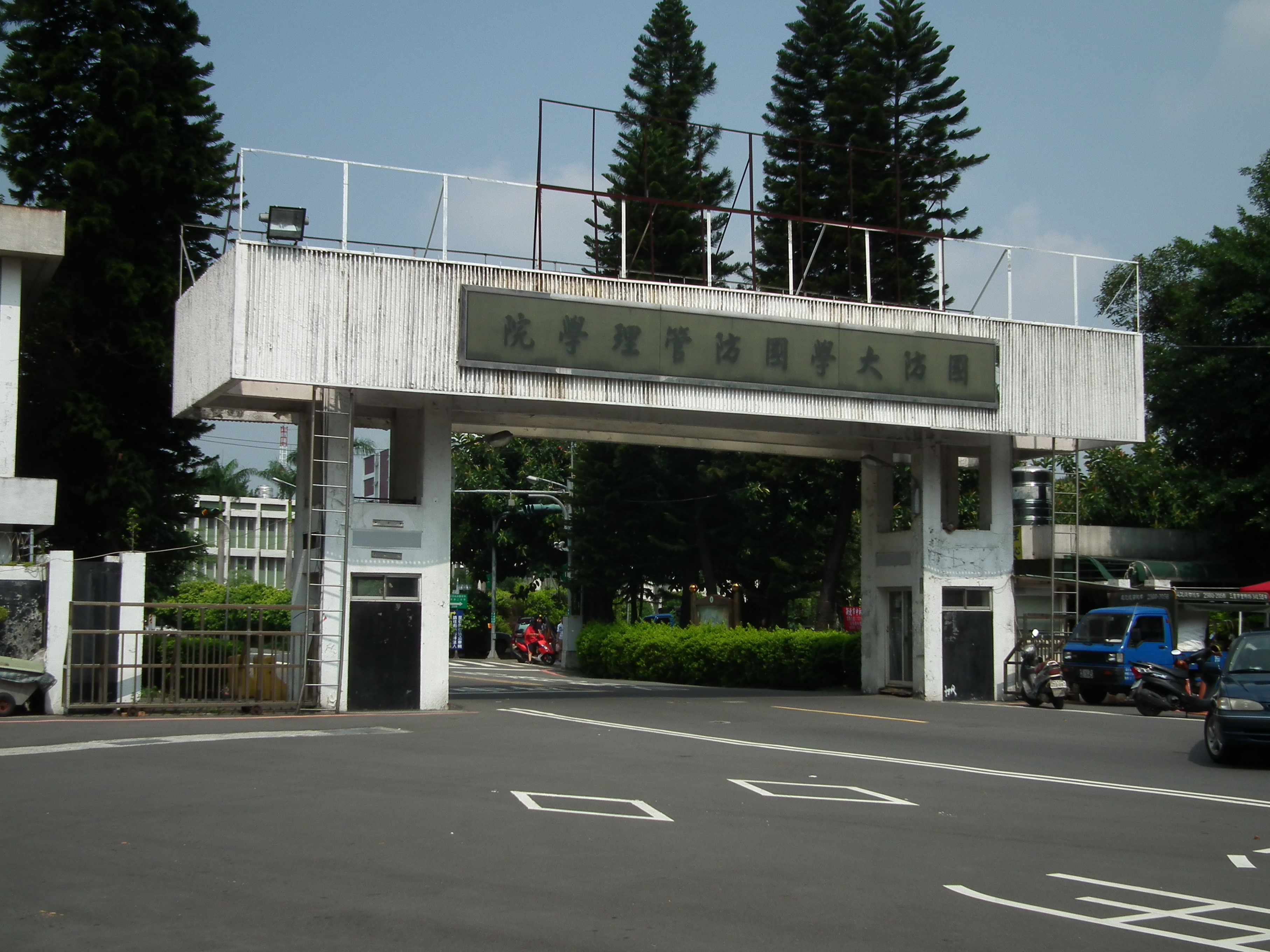 原國防大學國防管理學院大門。